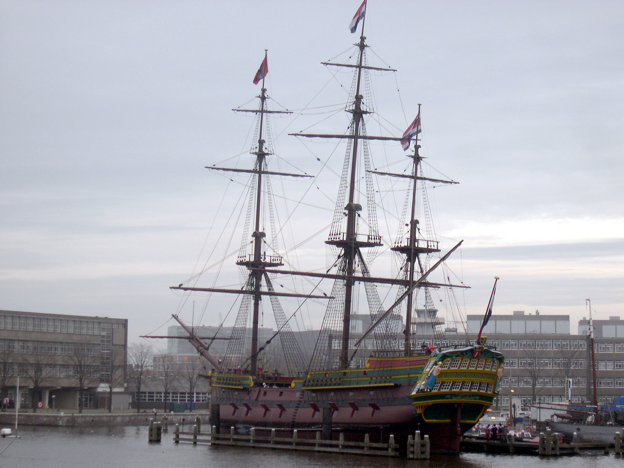 VOC ship in Amsterdam